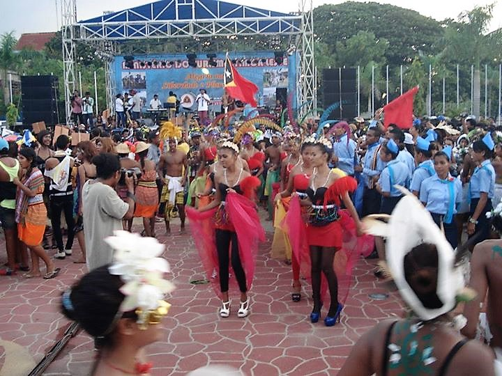 Carneval em Dili